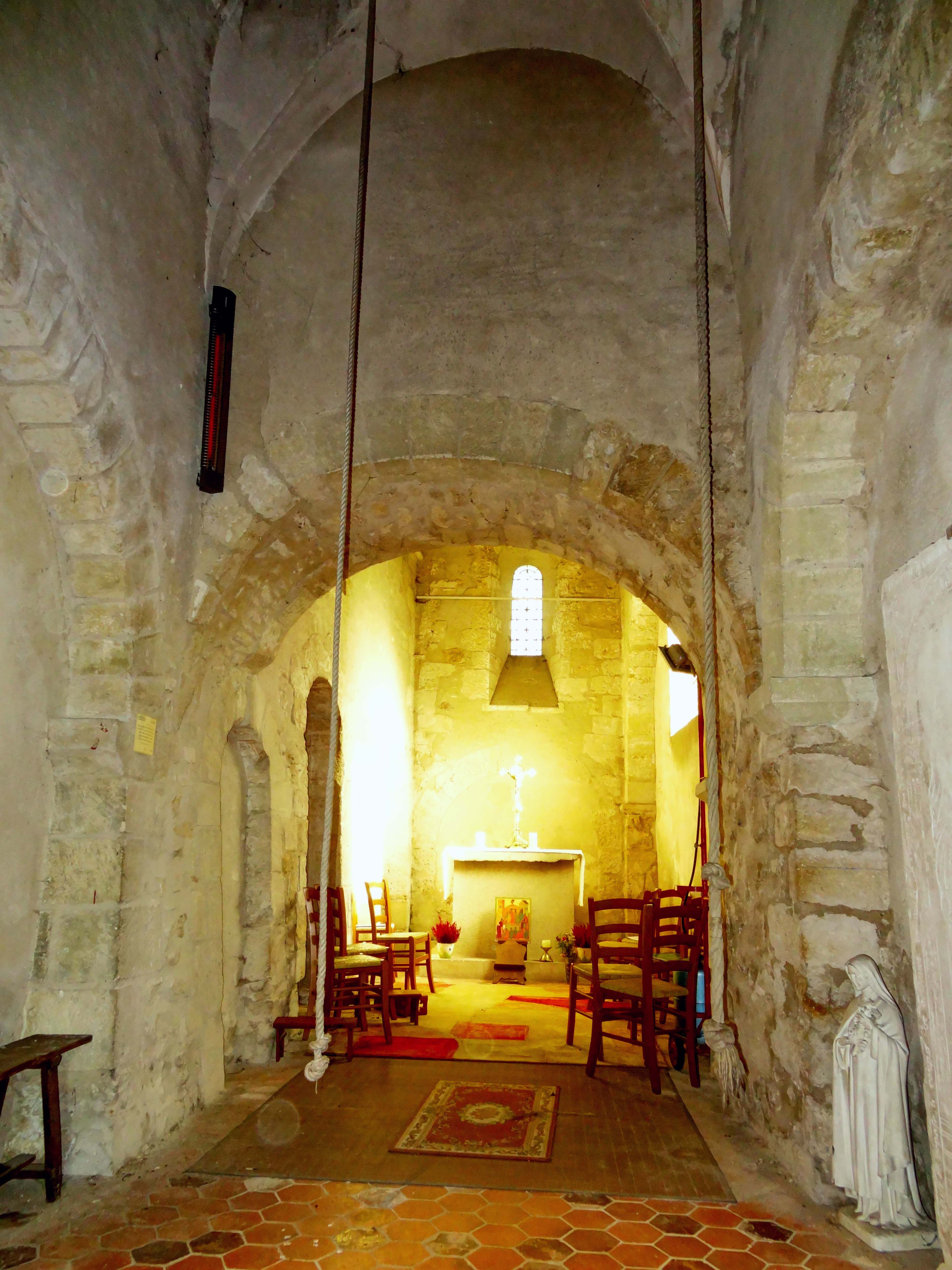 Intérieur de l'église - voir titre.